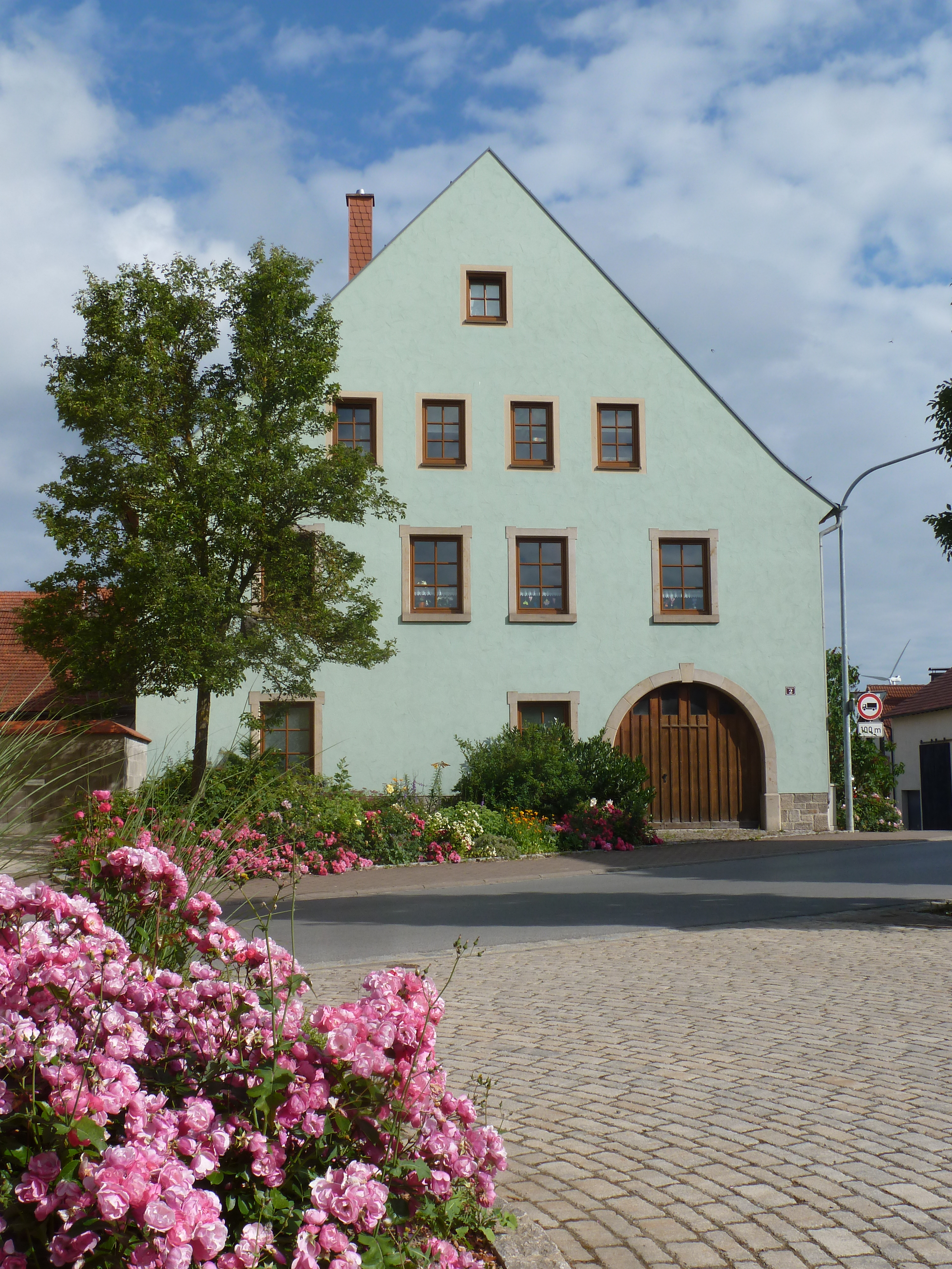 Die ehemalige Scheune des Rannunger Schlosses, teilweise zum Wohnhaus umgebaut, historisierende Fassade aus jüngerer Zeit